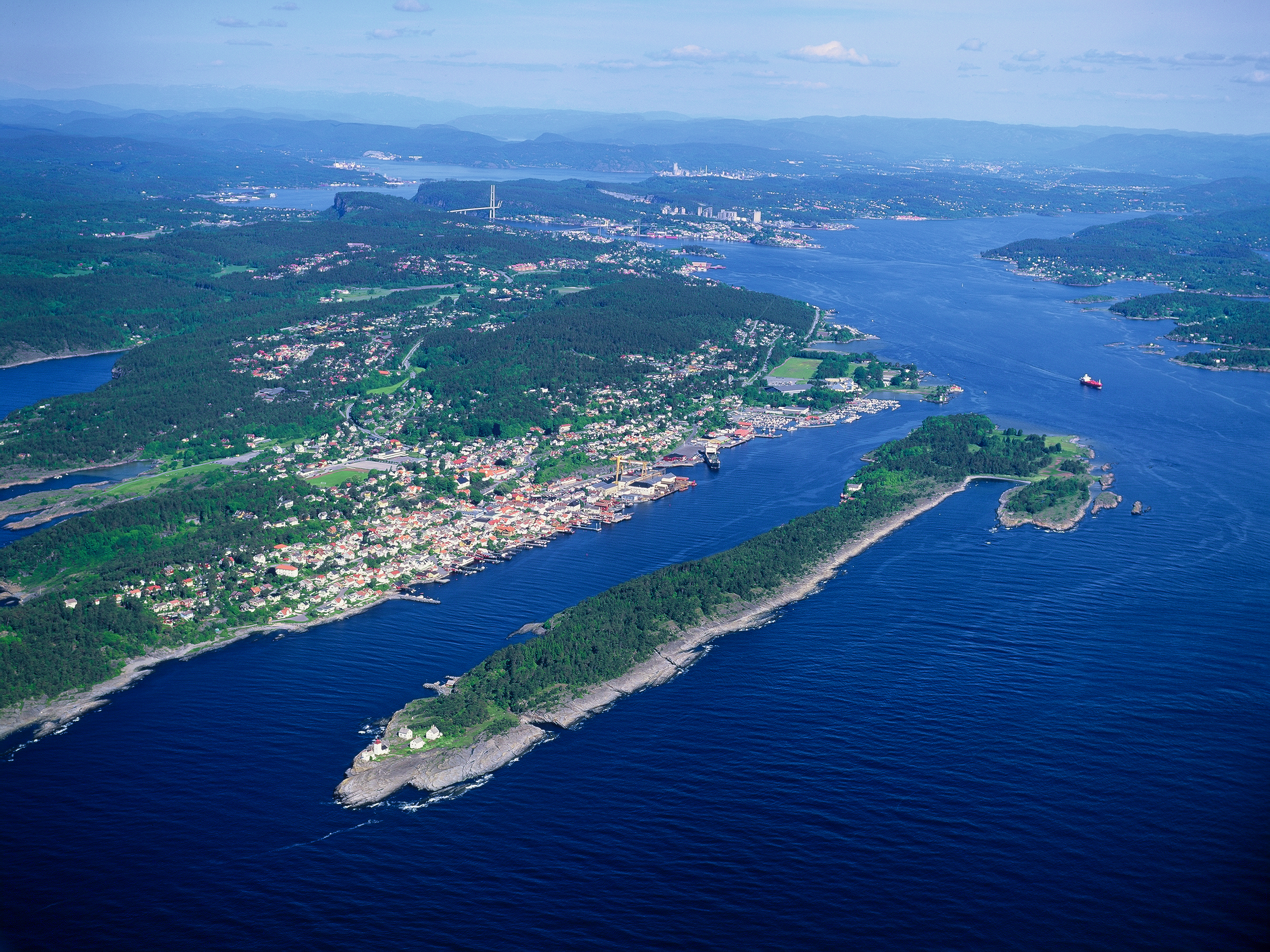 Langesund i Bamble kommune, med Langøya og Langesundfjorden i forgrunnen og Stathelle + Brevik i bakgrunnen.